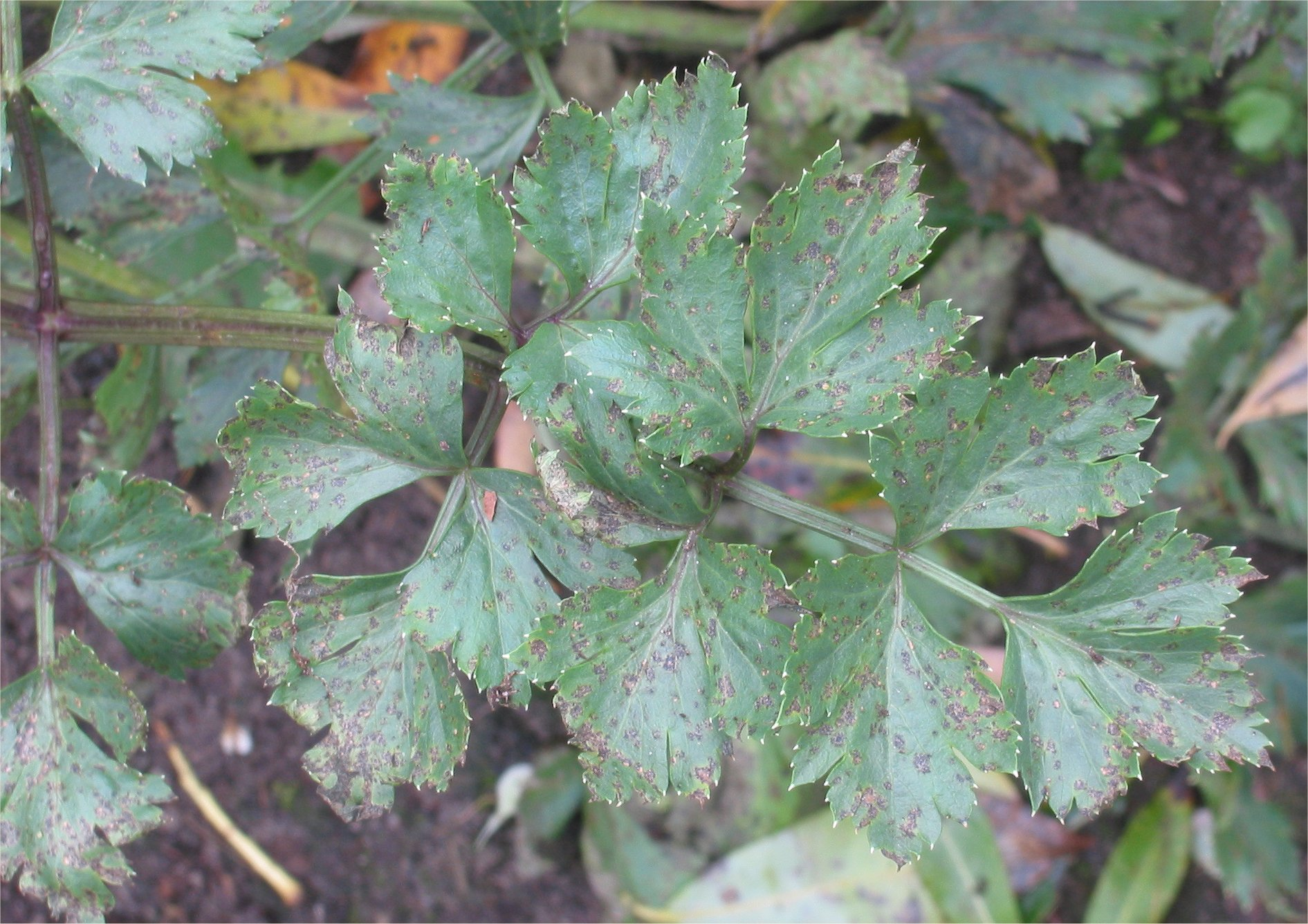 (Knolselderij bladvlekkenziekte op 'Dolvi') Apium graveolens var. rapaceum with Septoria apiicola